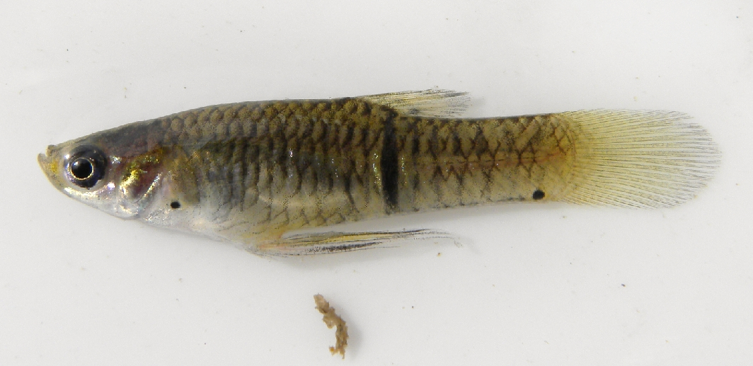 Ejemplar macho de Phalloceros caudimaculatus del Departamento de Rocha,Uruguay